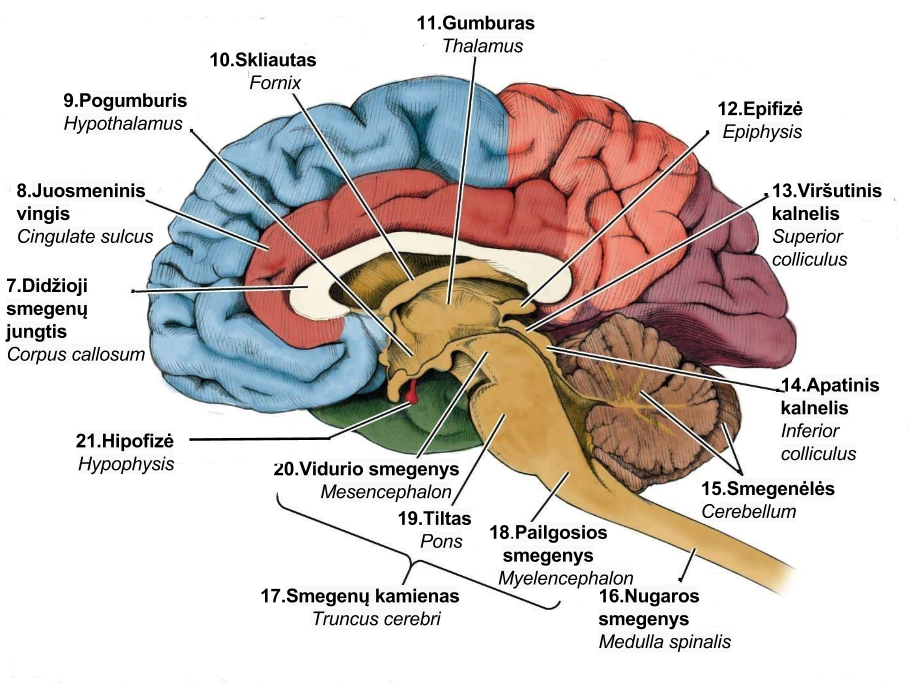 smegenu sandara